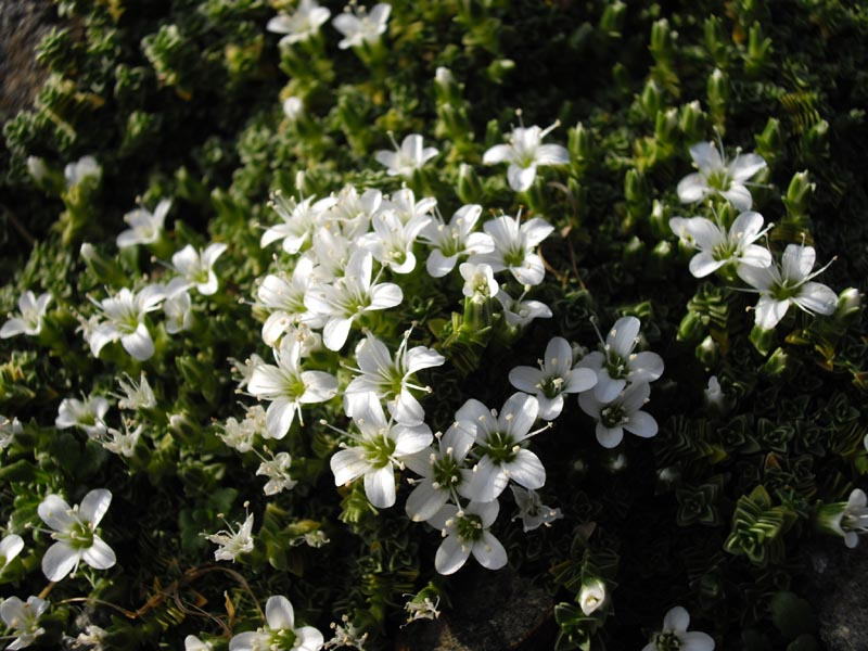 Arenaria tetraquetra